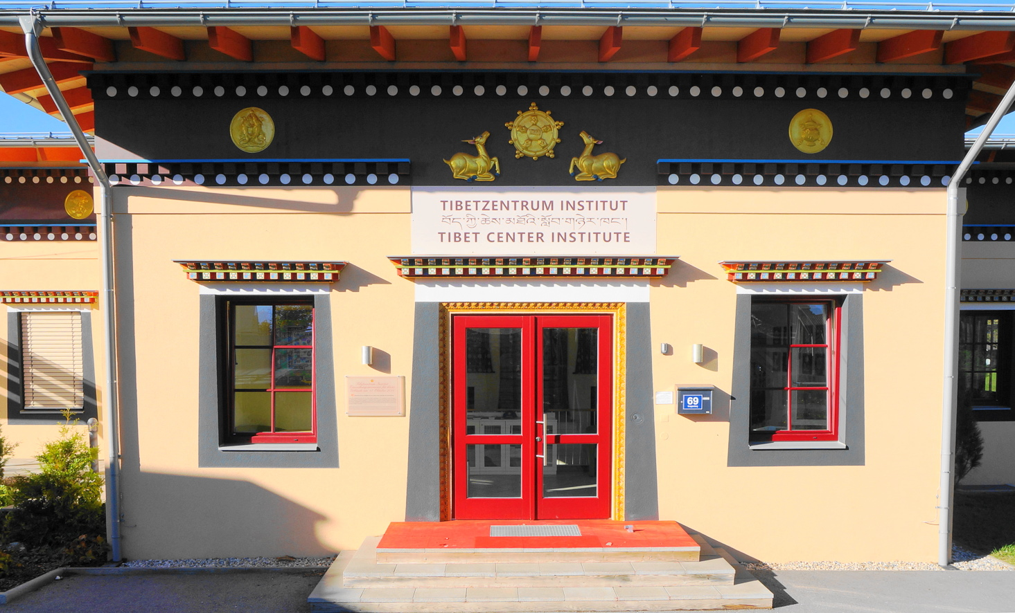 Das Tibetzentrum Österreich in Knappenberg, Gemeinde Hüttenberg im Görtschitztal, Kärnten, Österreich, EU ist ein Bildungshaus für Lehrgänge, Seminare und Vorträge von buddhistischer Philosophie, Mediation, Jamche-Kunye und Therapien der tibetanischen Medizin.